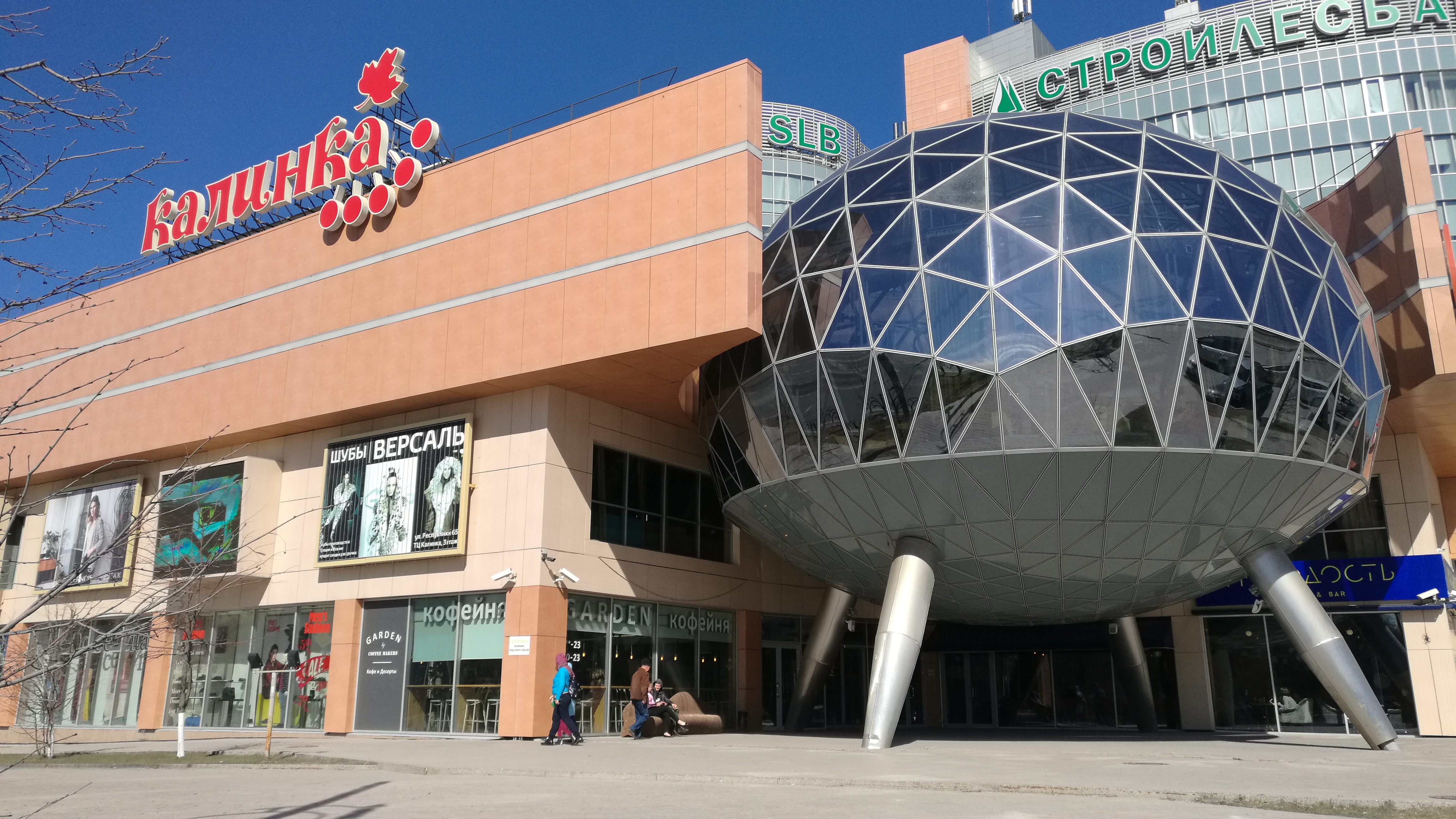 Aĉetcentro Kalinka. Tjumeno, Rusio.